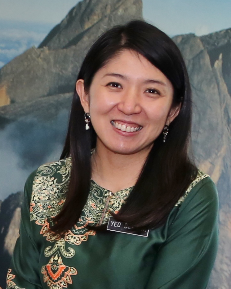 Yeo Bee Yin menerima kunjungan hormat Duta AS 2019